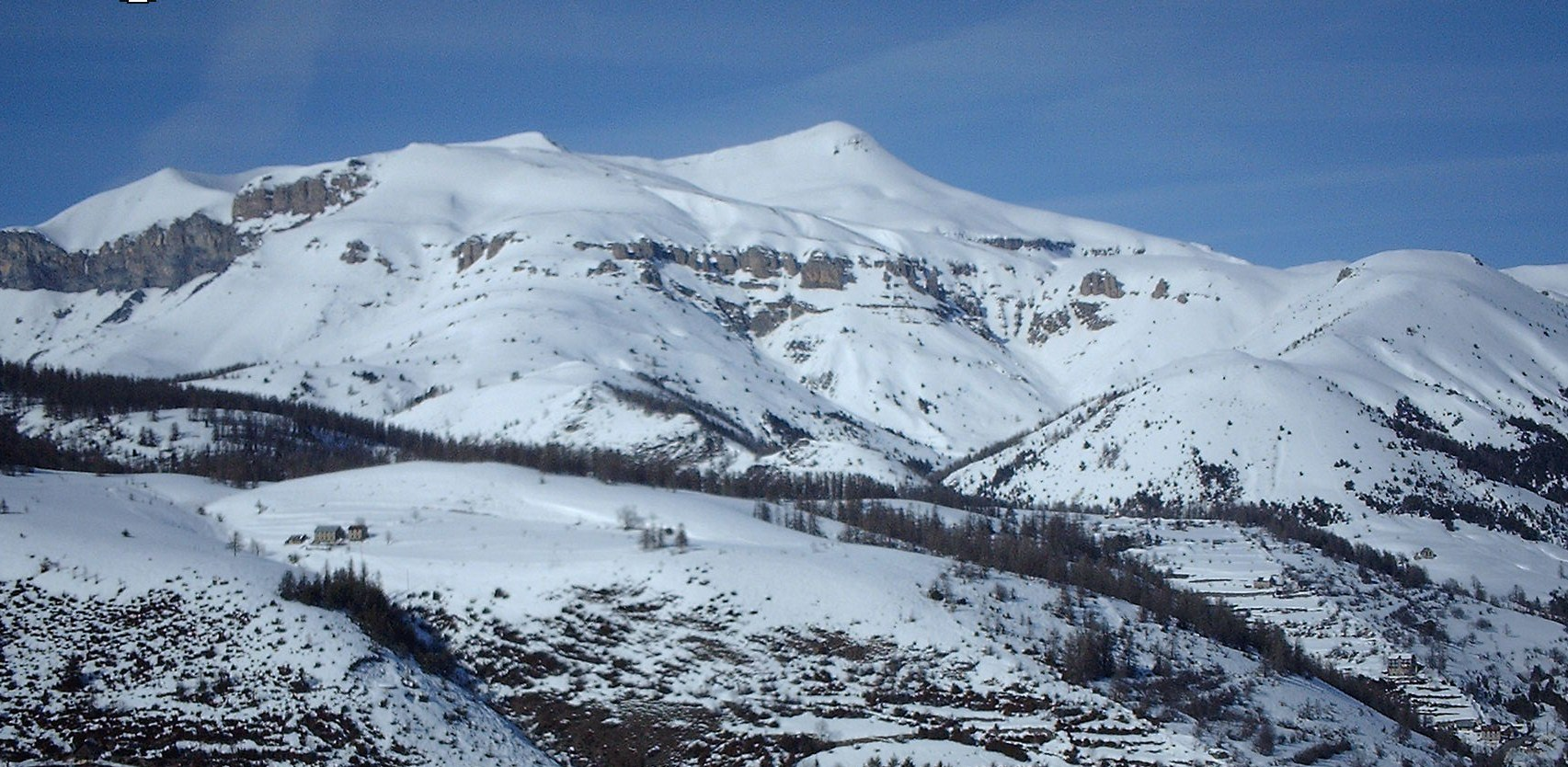 Des pistes de la station de Valberg (06 - FRANCE), vue sur le massif du Mont-Mounier (2817 m).